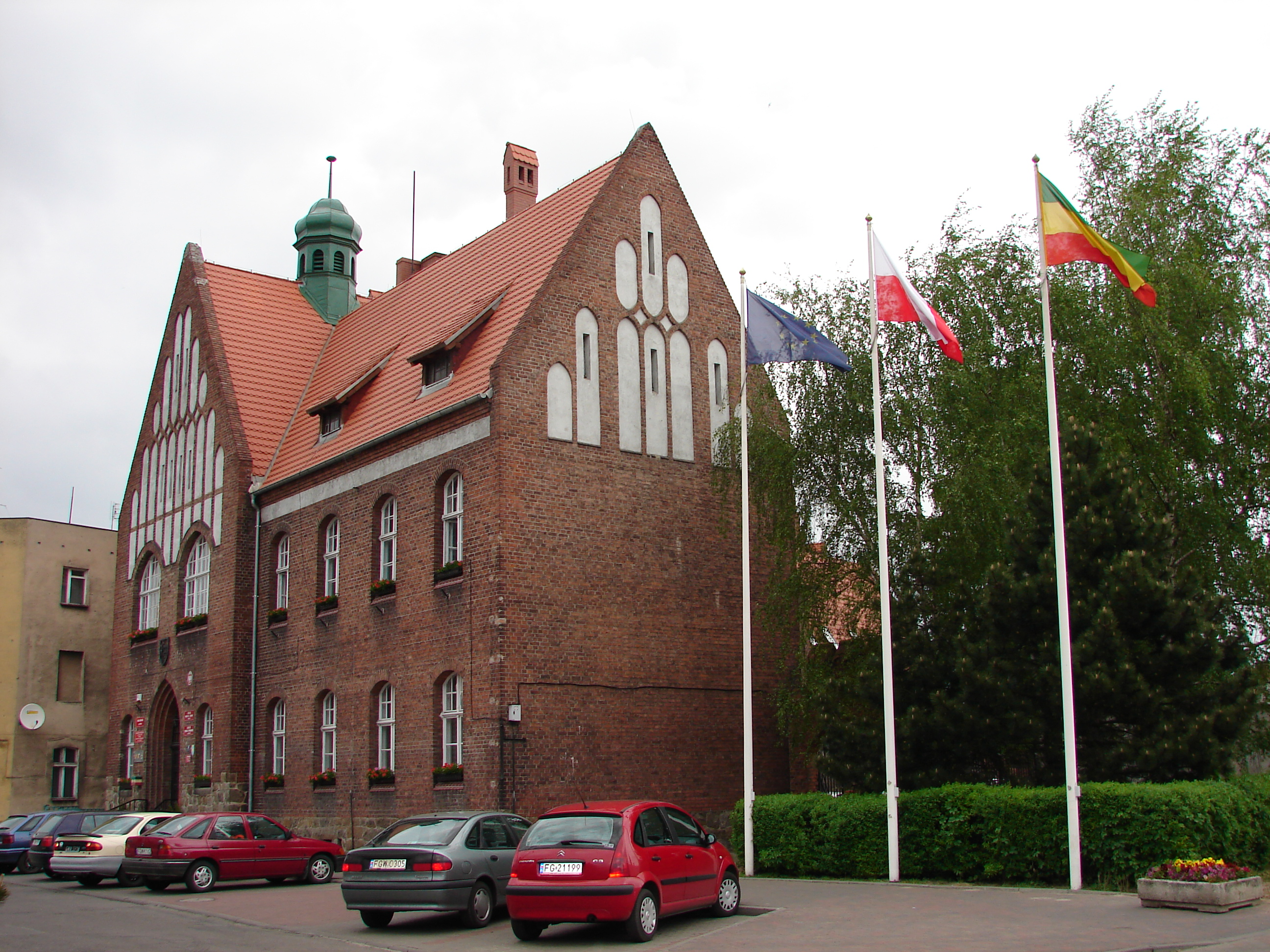 Urząd Miasta i Gminy Witnica